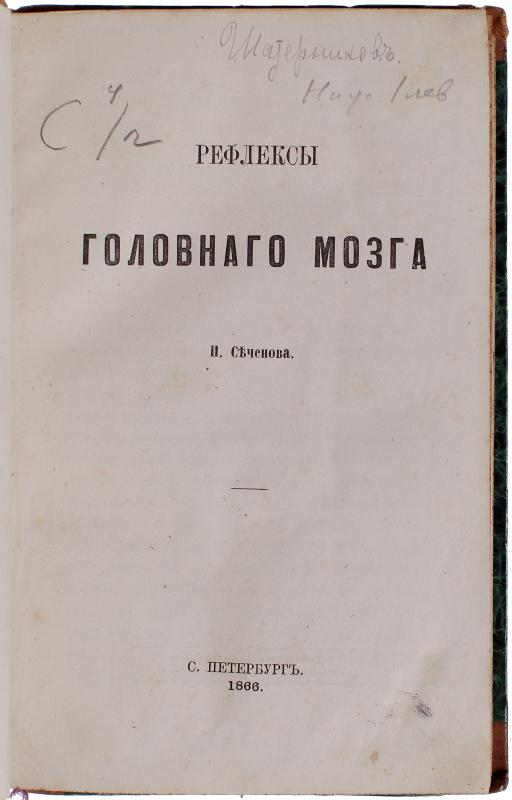 Титульный лист первого издания книги "Рефлексы головного мозга" И. М. Сеченова. Санкт-Петербург, 1866 год.